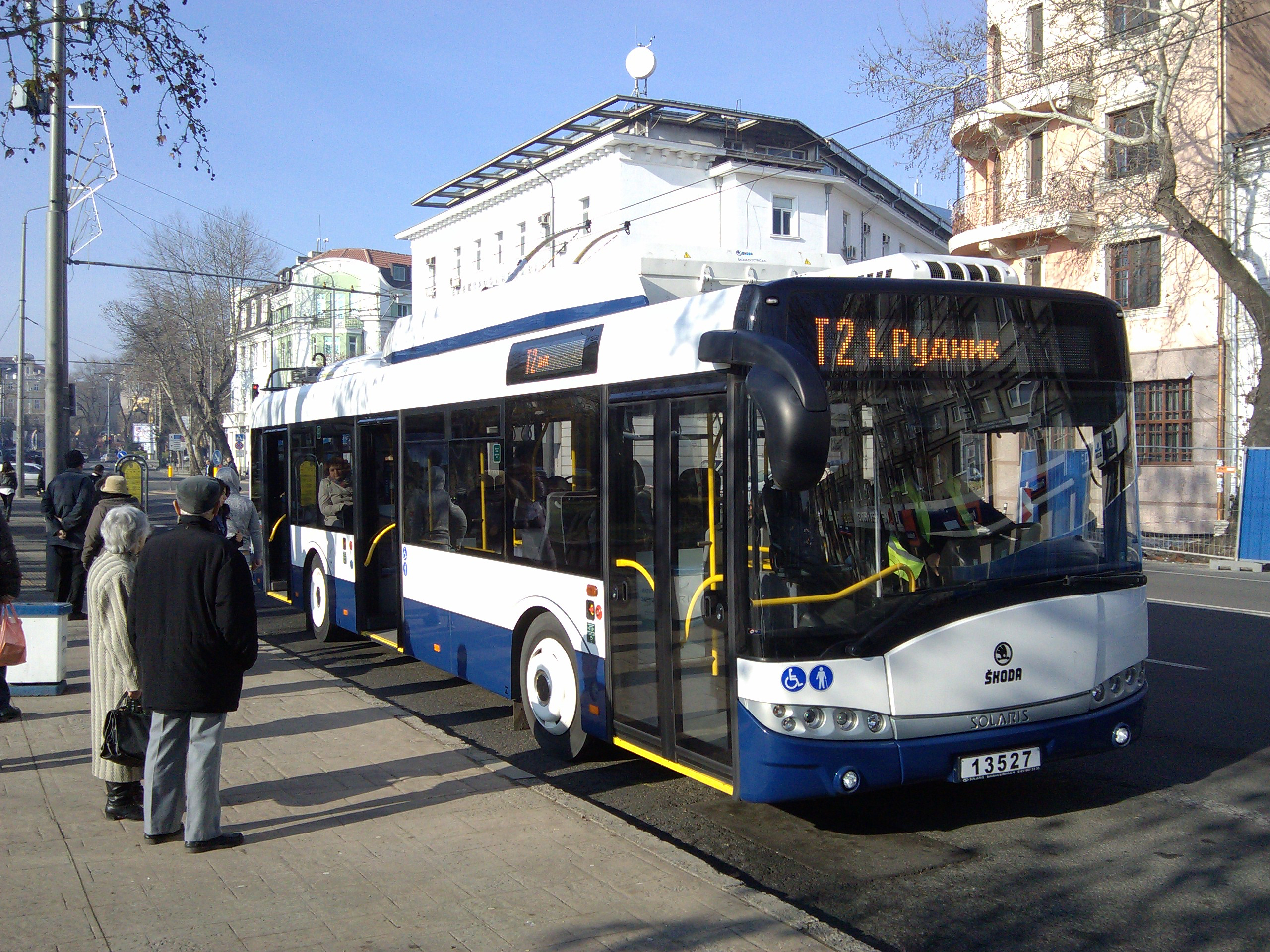 Бургасский троллейбус маршрута Т2